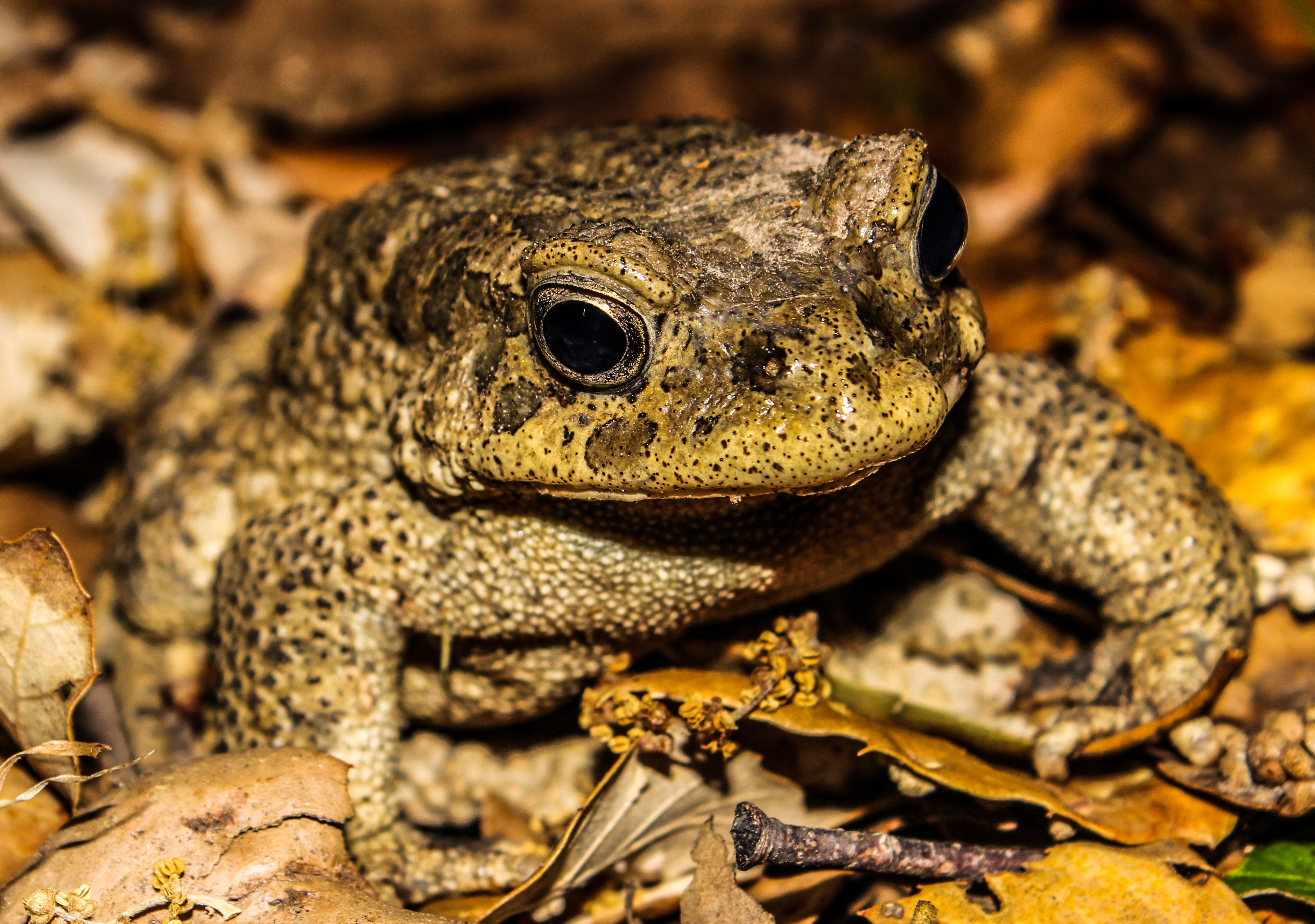 Discoglossus pictus, barrage Bni Mtir, Tunisia